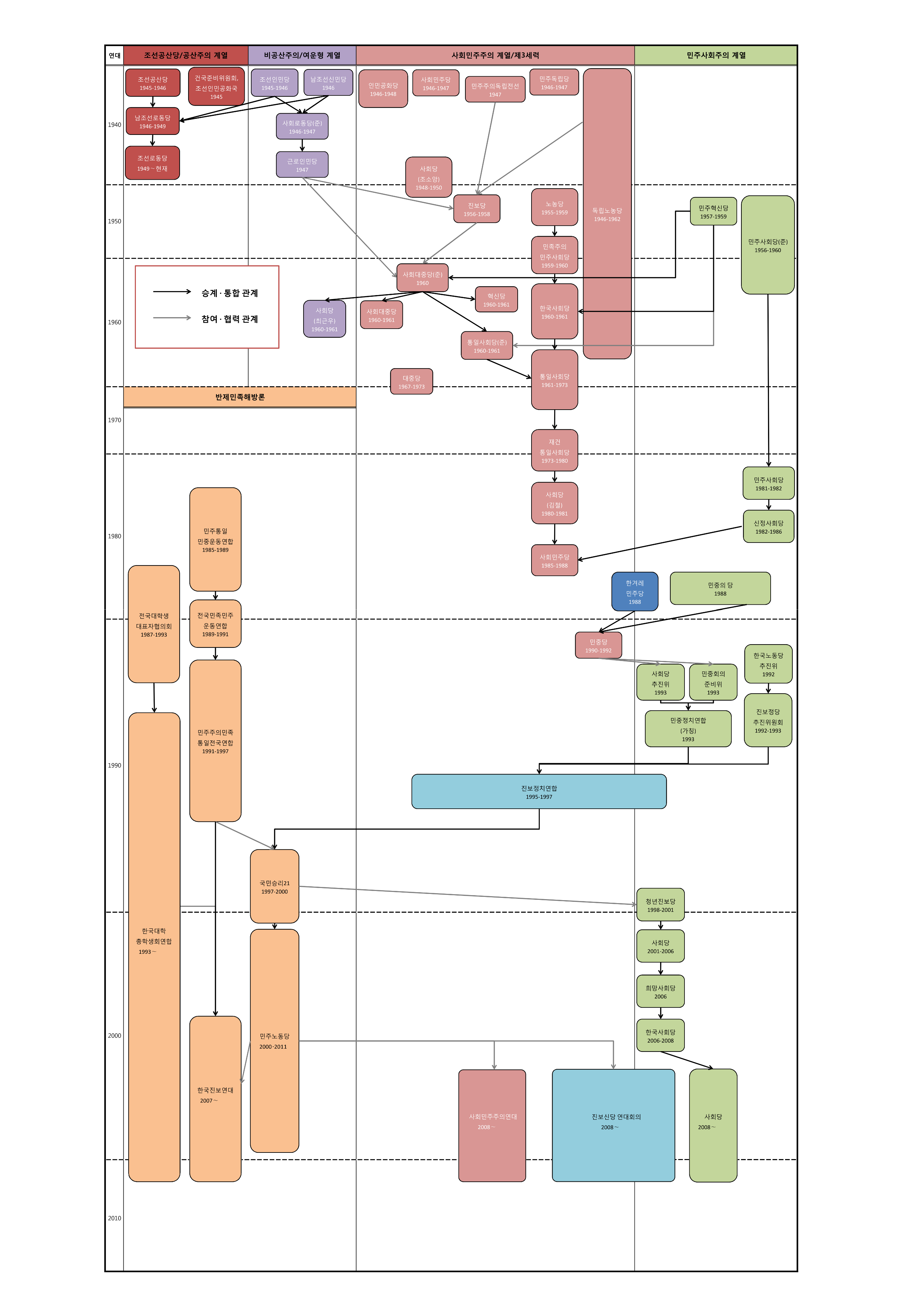 광복 이후 대한민국 진보세력 연표